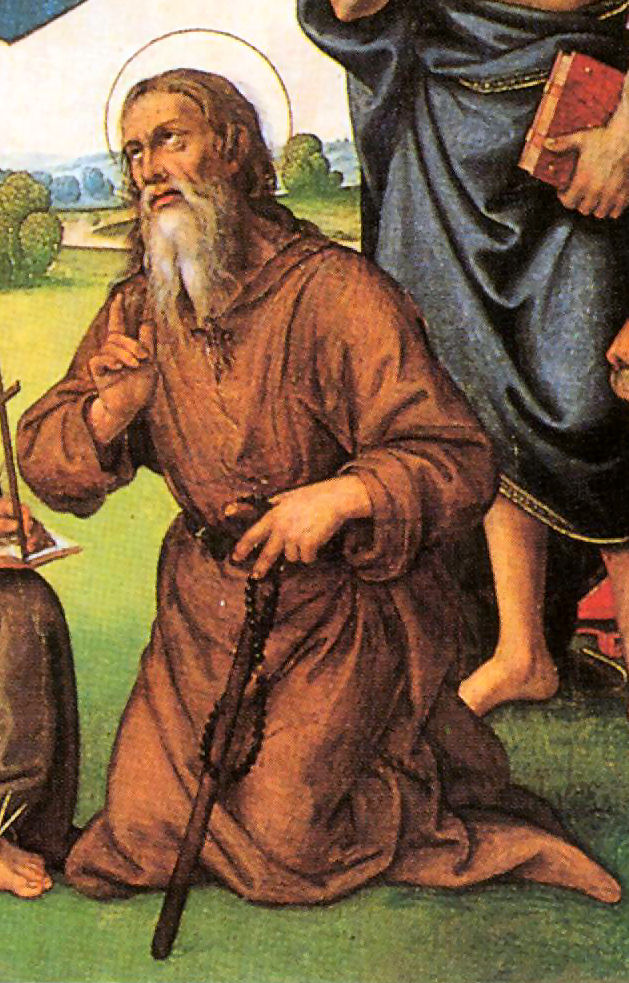 detail